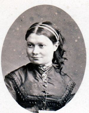 Flora Annie Steel im Alter von 20 Jahren